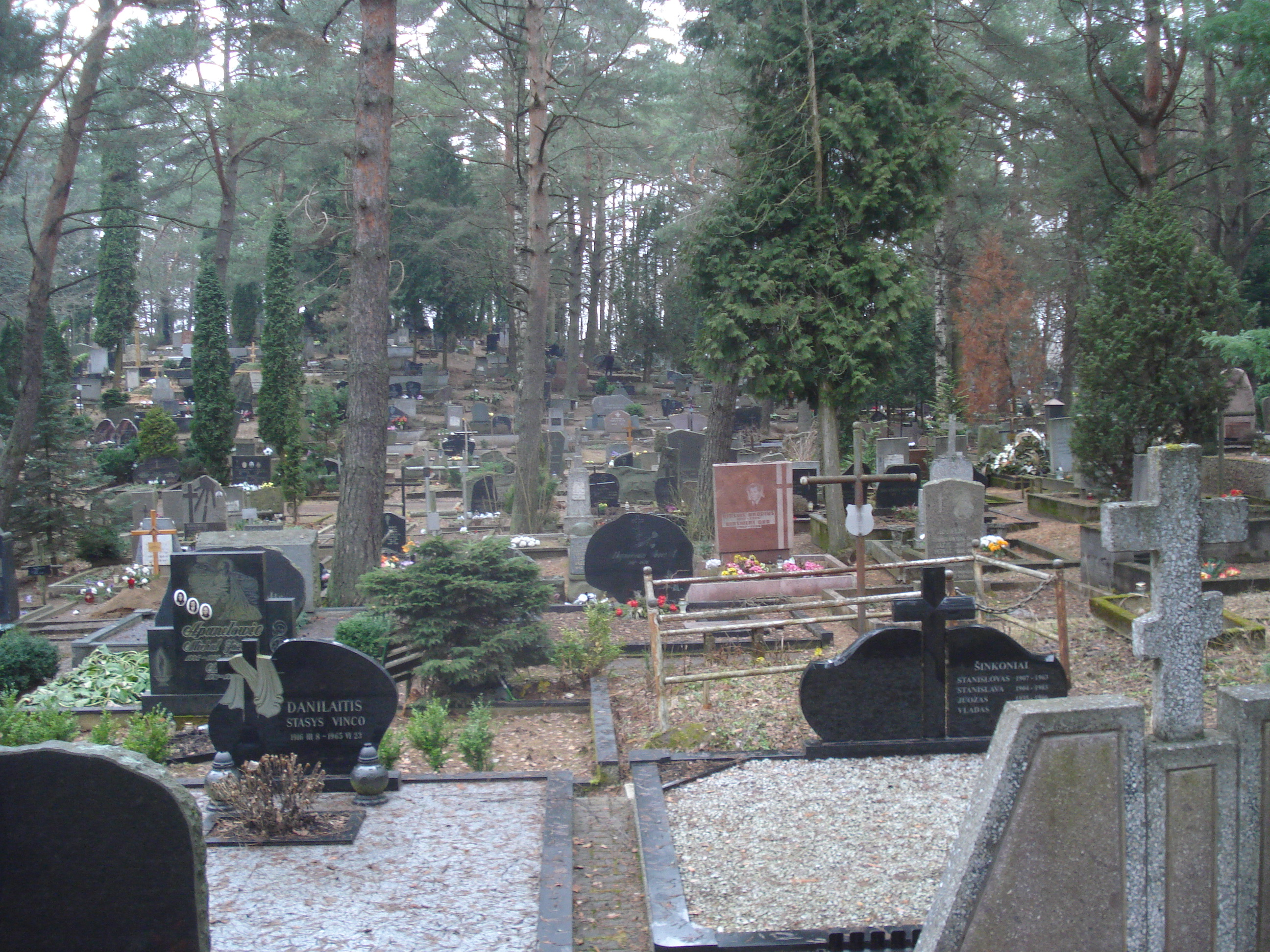 Saltoniškių kapinės (Vilnius). Šeškinėje, prie Ąžuolyno ir Ozo gatvių sankirtos